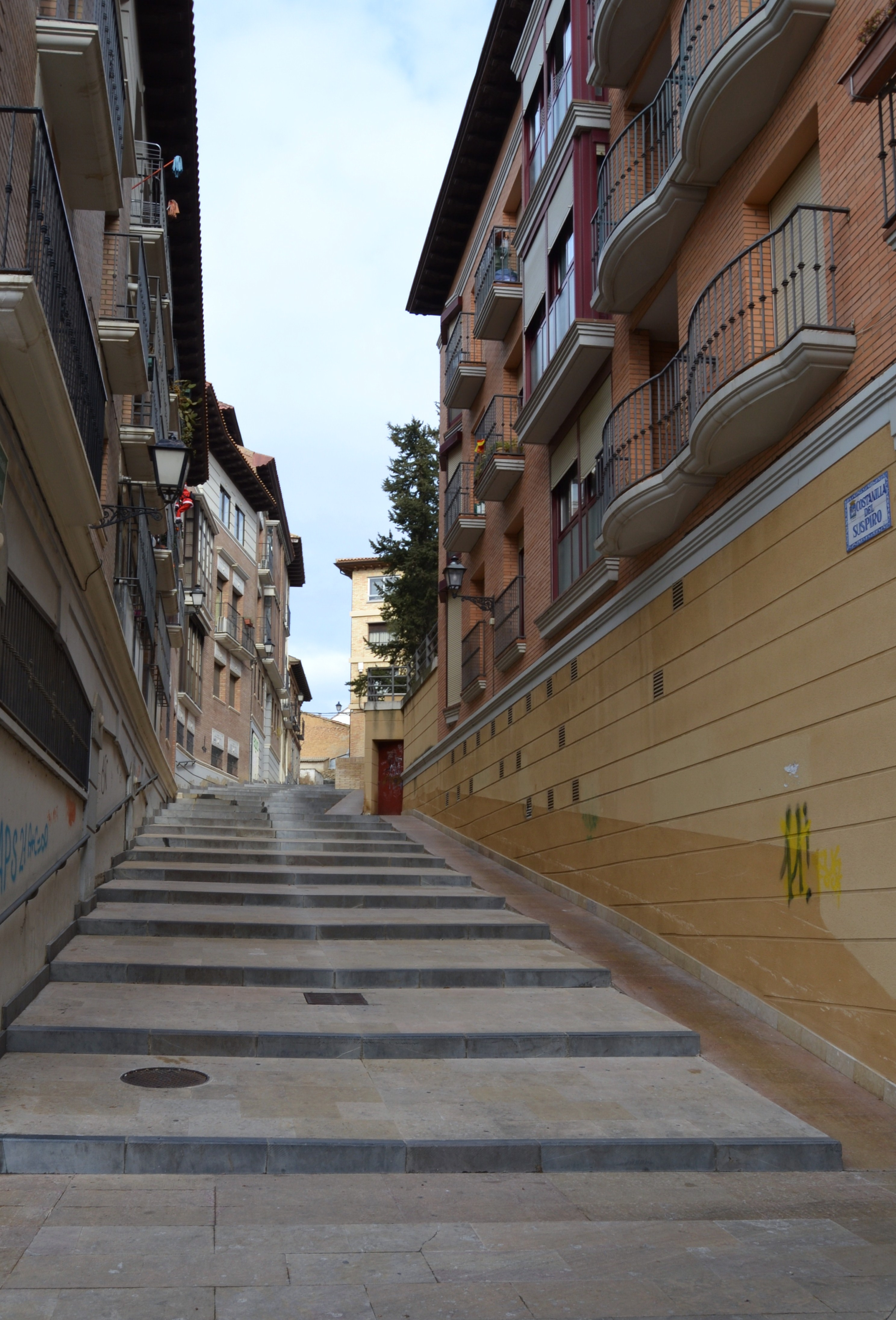 Costanilla del Suspiro, Osca.